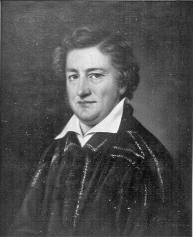 Johann Claudius von Lassaulx, Porträt, Foto eines verschollenen Gemäldes von Simon Meister (1796-1844), 1827